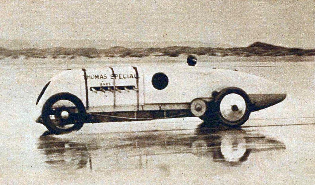 La Higham-Thomas Special Babs de John G. Parry-Thomas le 27 avril 1926 à Pendine Sands.